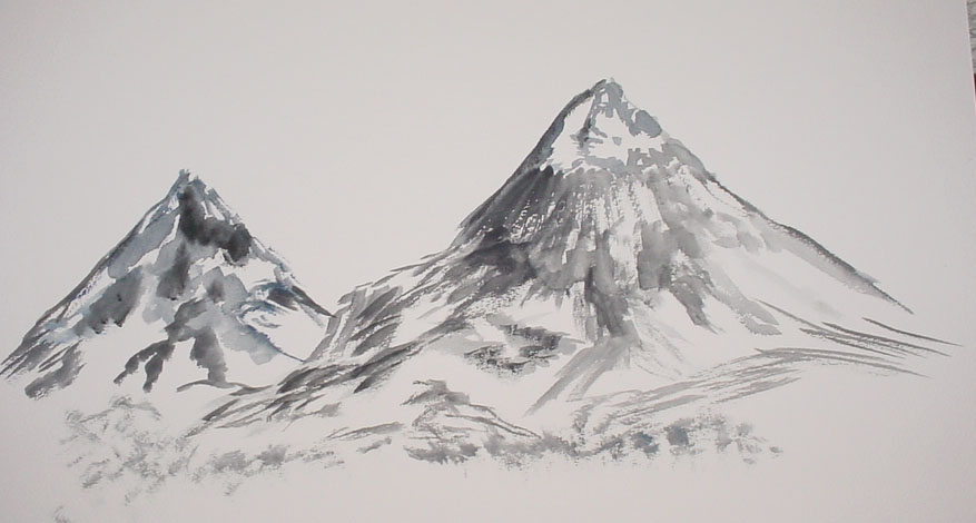 Kyrkja fra Leirvassbu-Område, Jotunheimen, Norge.